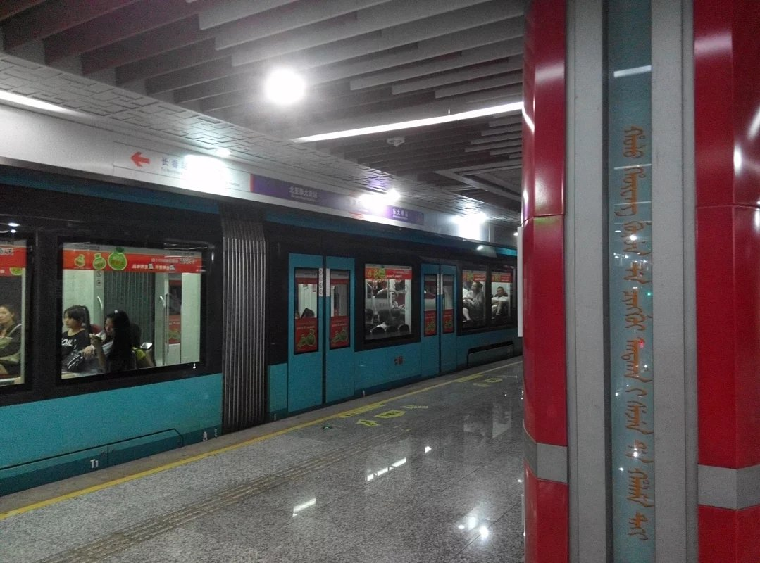 长春轨道交通4号线伪皇宫站站台